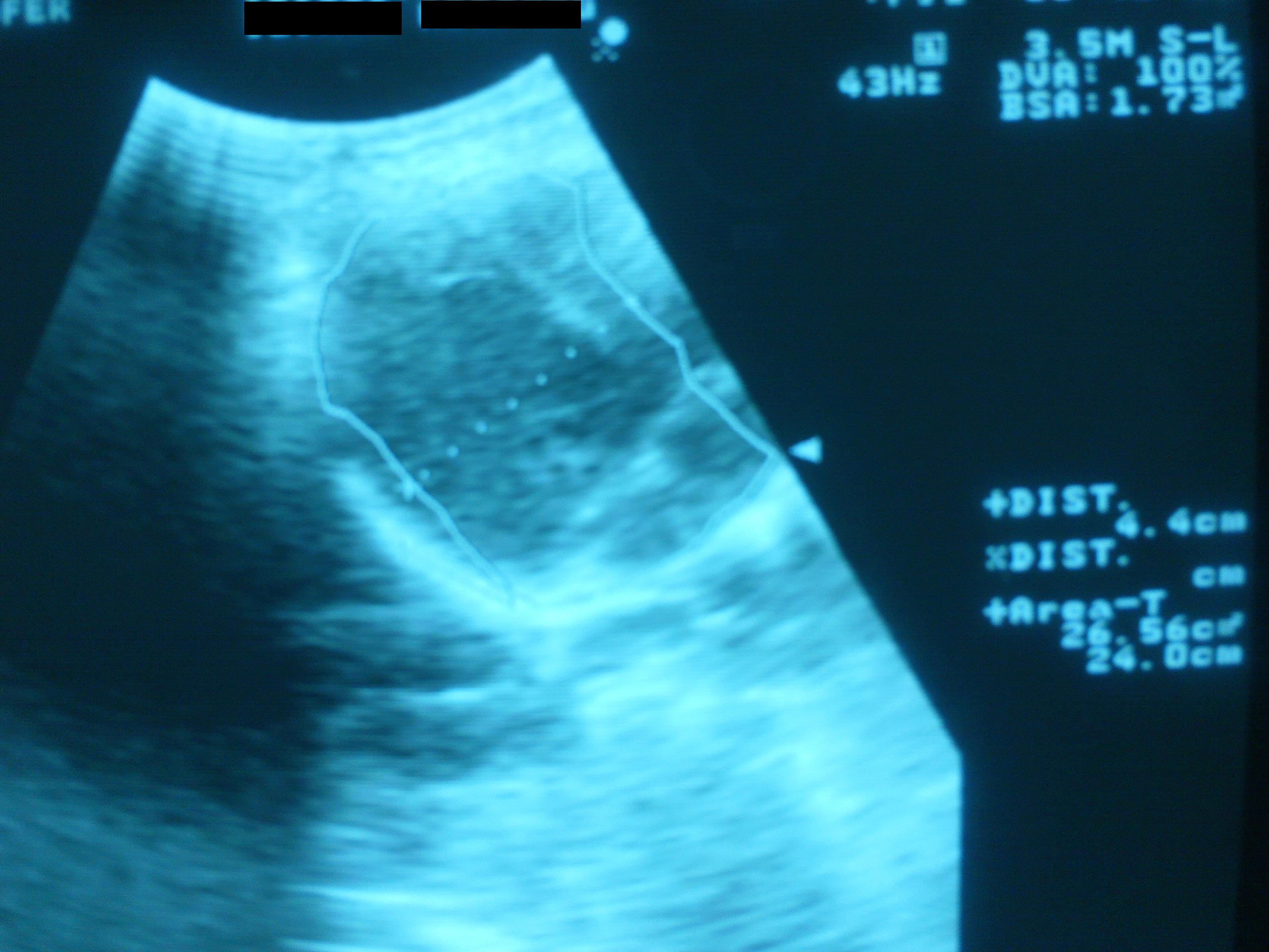 a heart picture